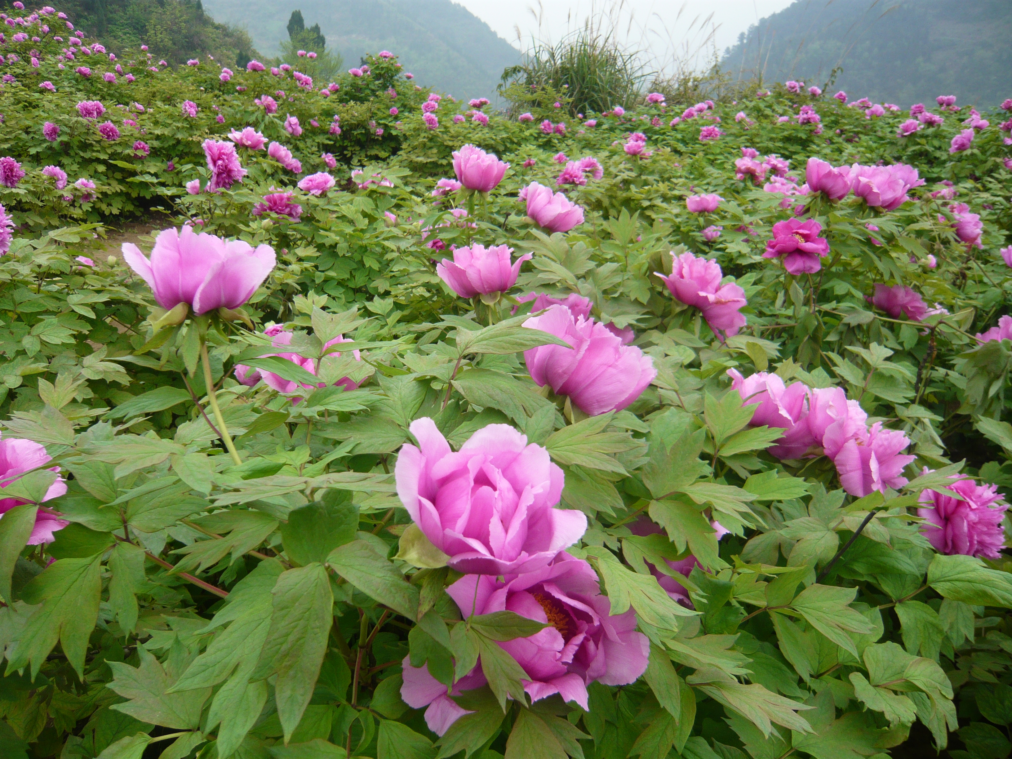 中文（中国大陆）: 重庆市垫江县太平牡丹在山野中盛开